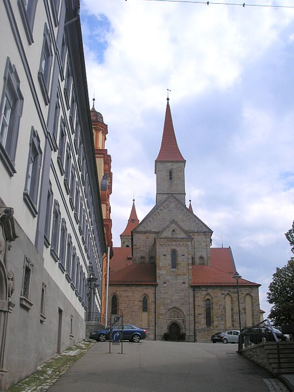 Ehemalige Stiftskirche St. Vitus (Ellwangen a.d. Jagst, BW). Ansicht von Westen. Eigene Aufnahme, Aug. 2006 / St. Vitus, Ellwangen a.d. Jagst, Baden-Wuerttemberg, Germany. View from west. Own Photo, Aug. 2006